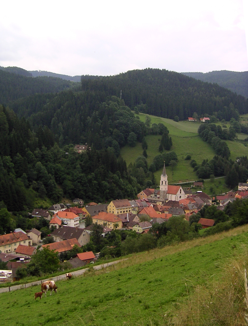 Hüttenberg in Kärnten - Ansicht auf dem Weg nach Maria Waitschach